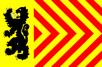 Vlag gemeente Langedijk